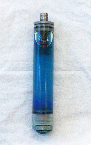 Foto einer Kupfer/Kupfersulfat-Elektrode